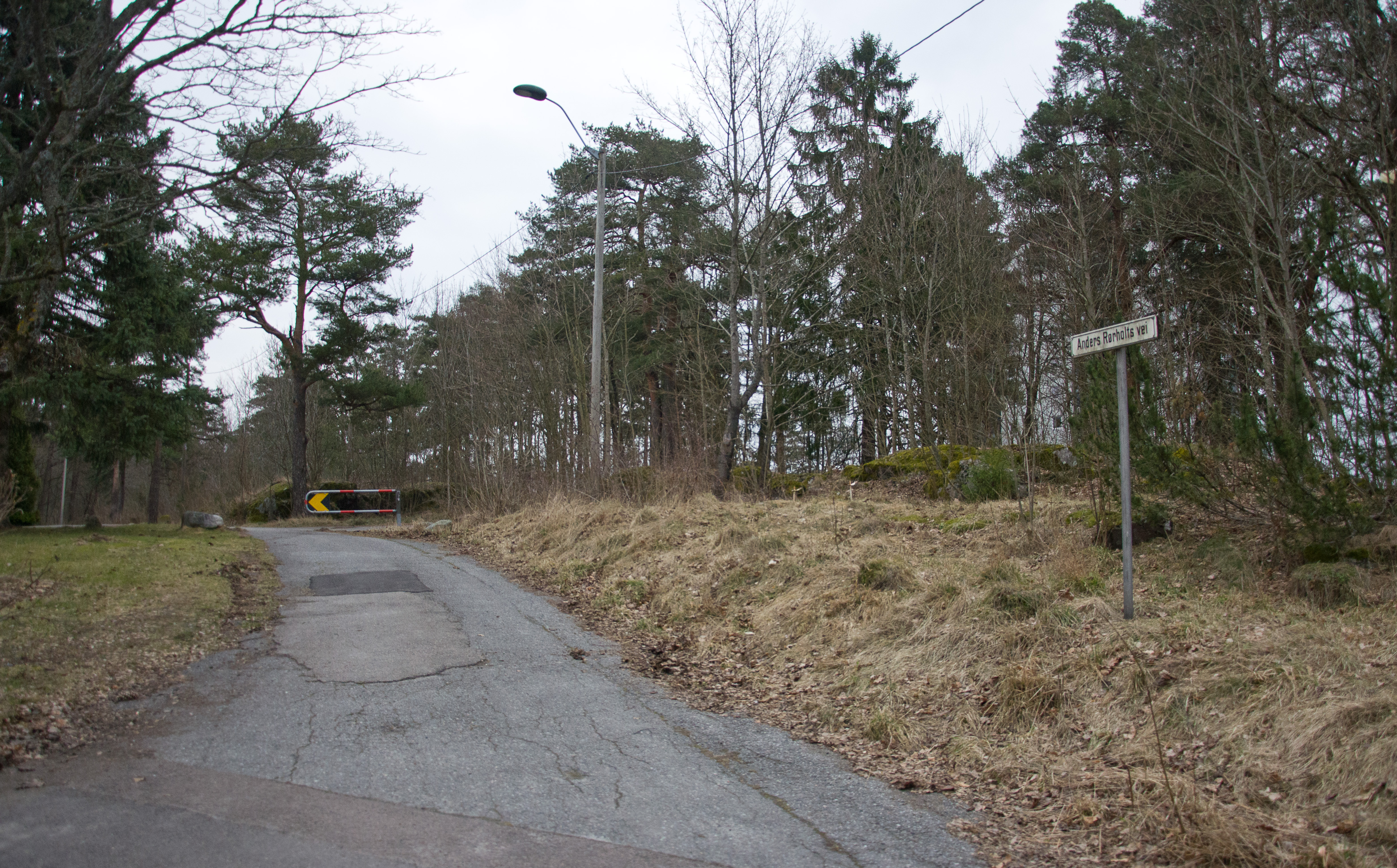 Anders Rørholts vei, Tønsberg